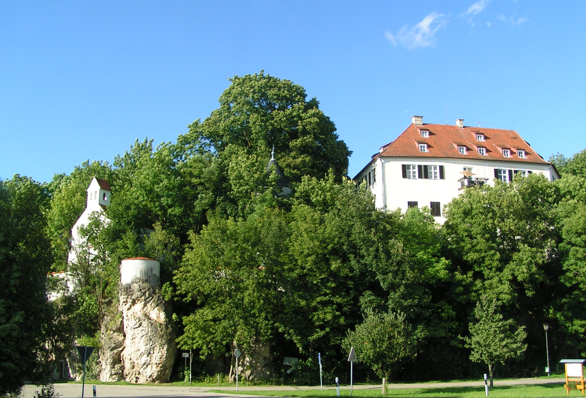 Schloss Wackerstein, im Ortsteil Wackerstein des Marktes Pförring,Landkreis Eichstätt, Oberbayern